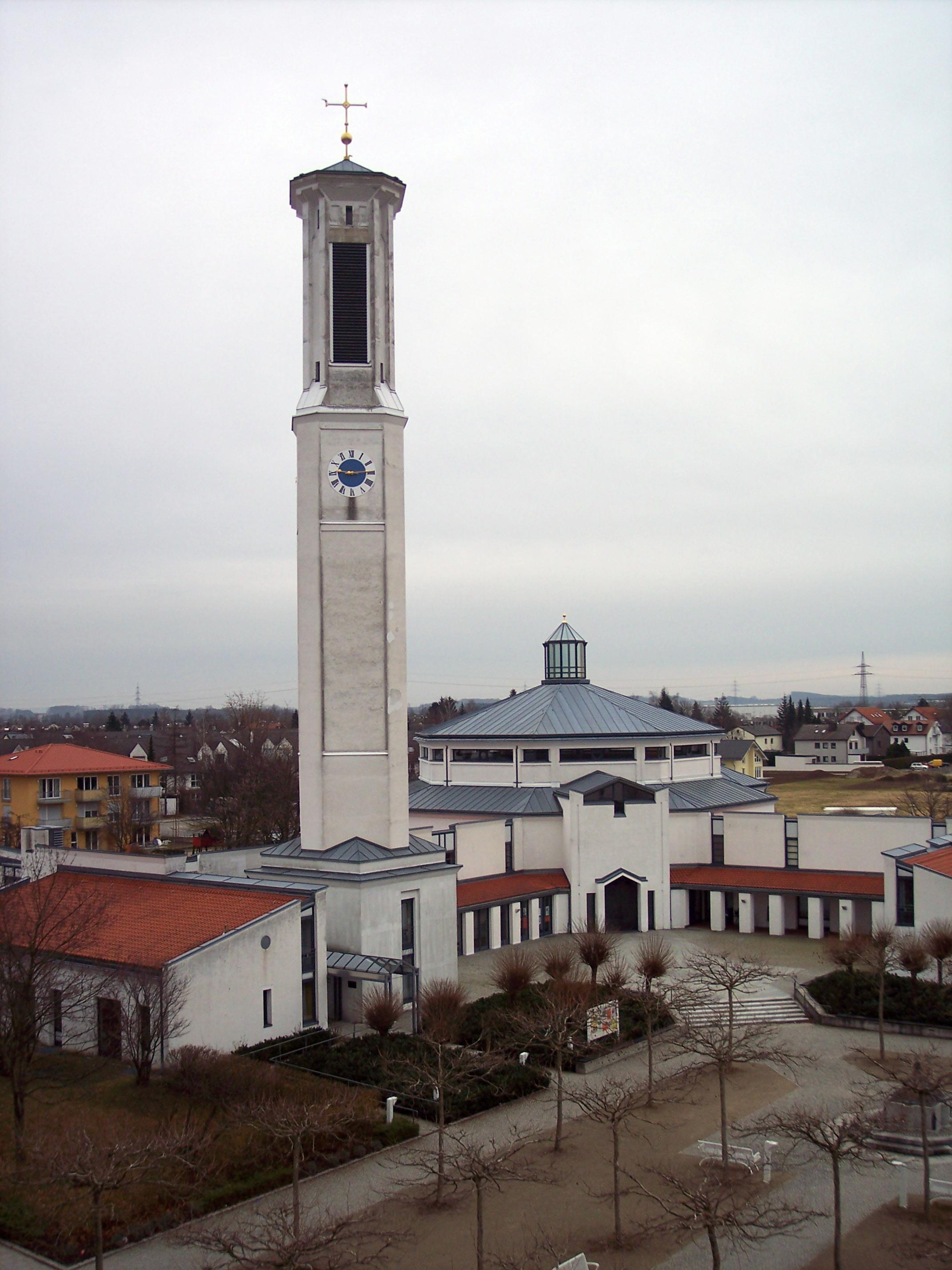 image shows church St. Peter in Heimstetten, Kirchheim bei München, Germany